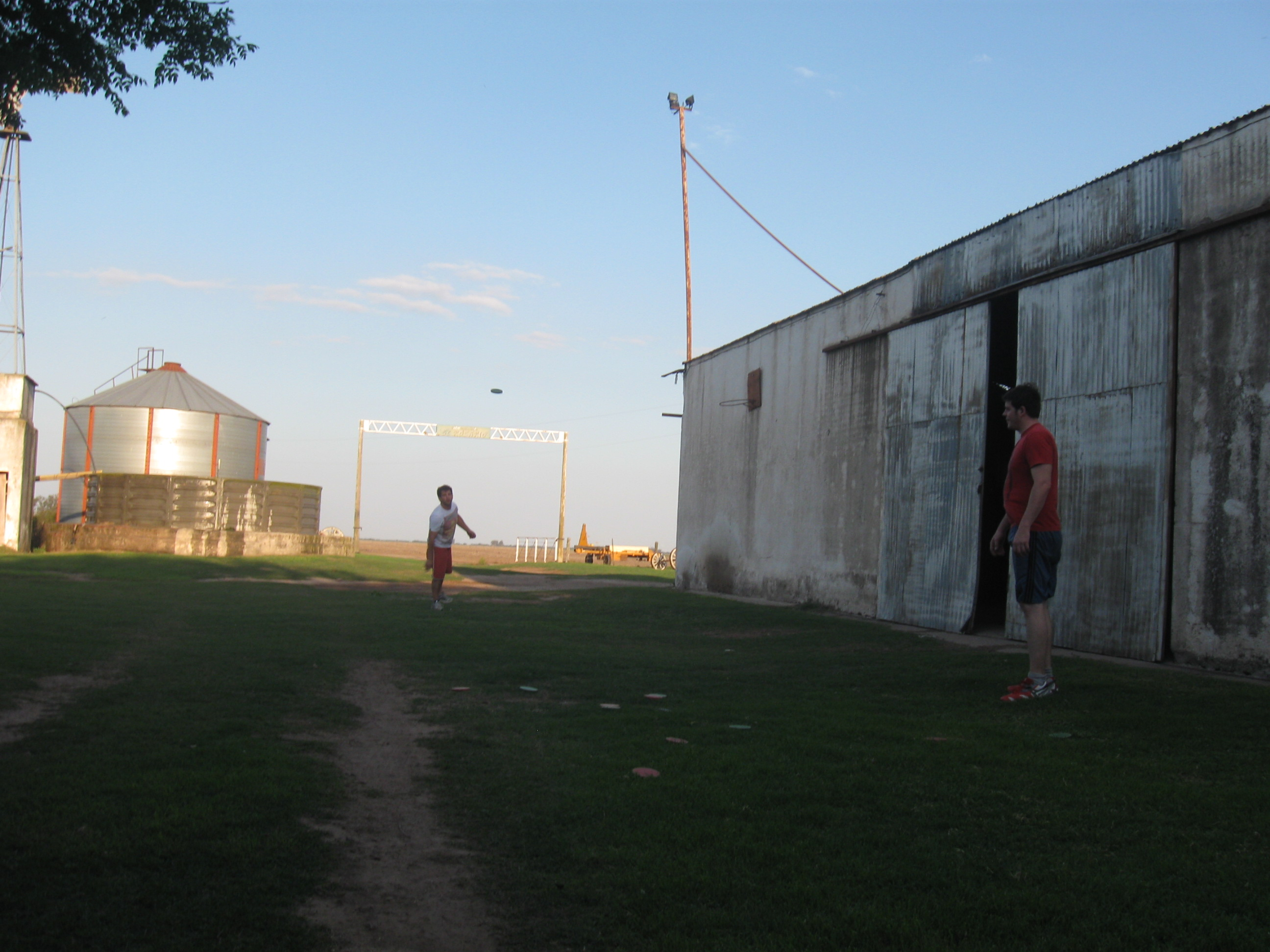 Tipico juego tradicionalista y campero